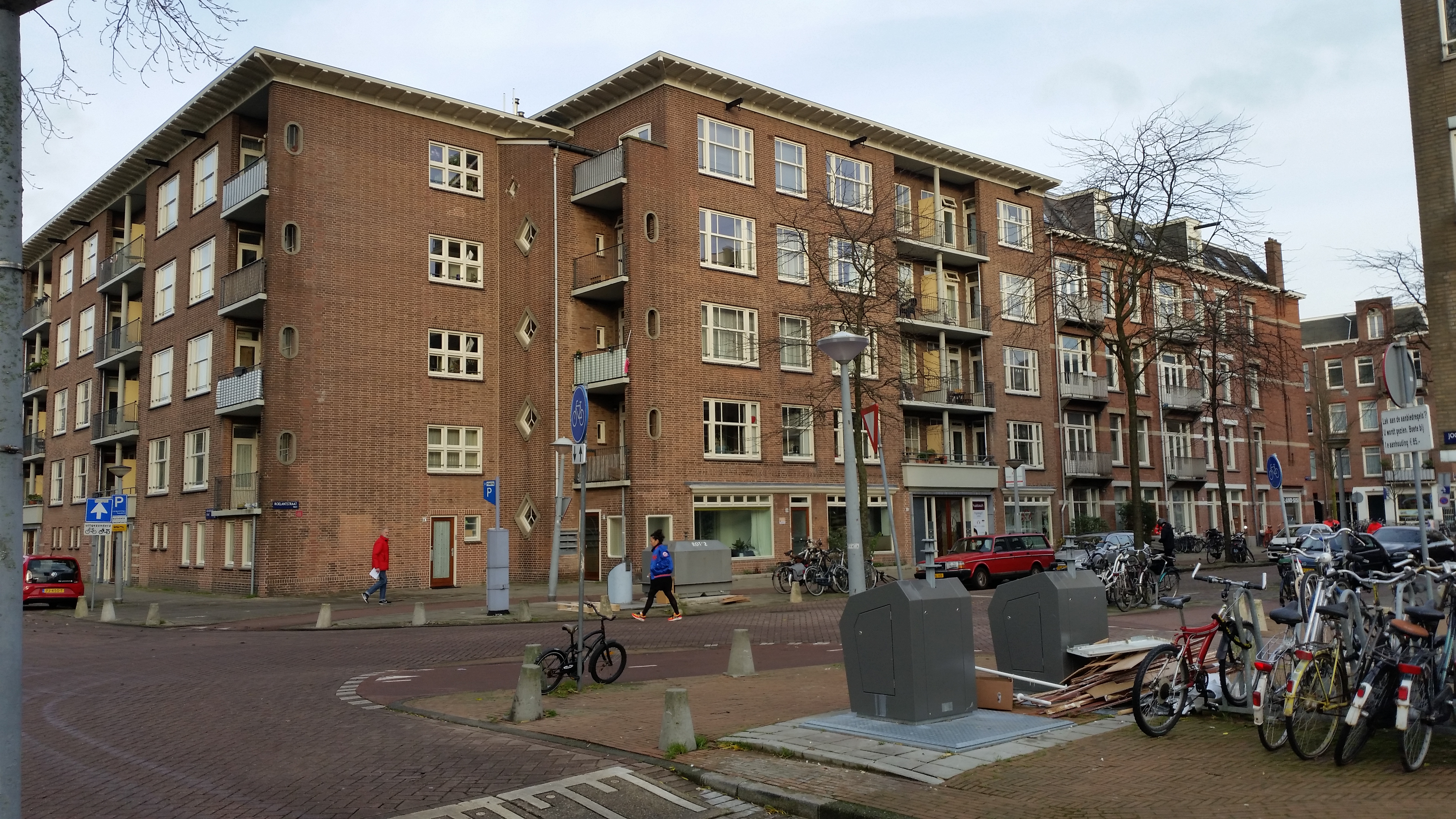 Van links naar rechts: Vier Heemskinderenstraat, Roelantstraat 12-2, Admiraal de Ruijterweg, Amsterdam-West